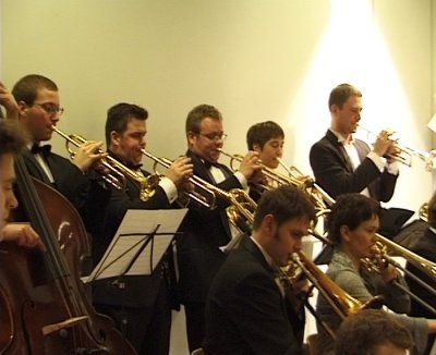 Det Kongelige Danske Musikkonservatoriums Big Band, messingsektionen